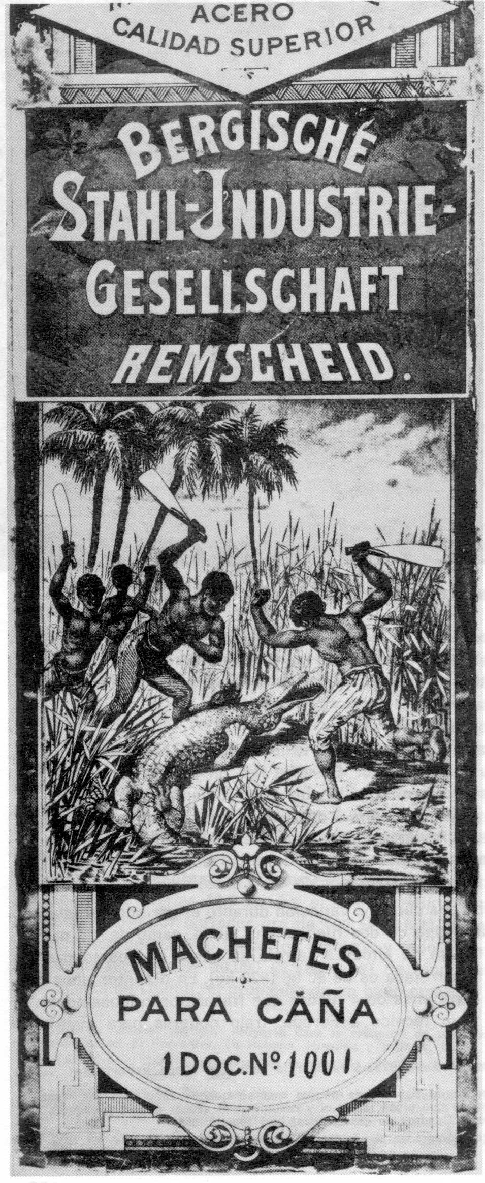 Schild auf einer Macheten-Pakung aus Deutschland von 1885